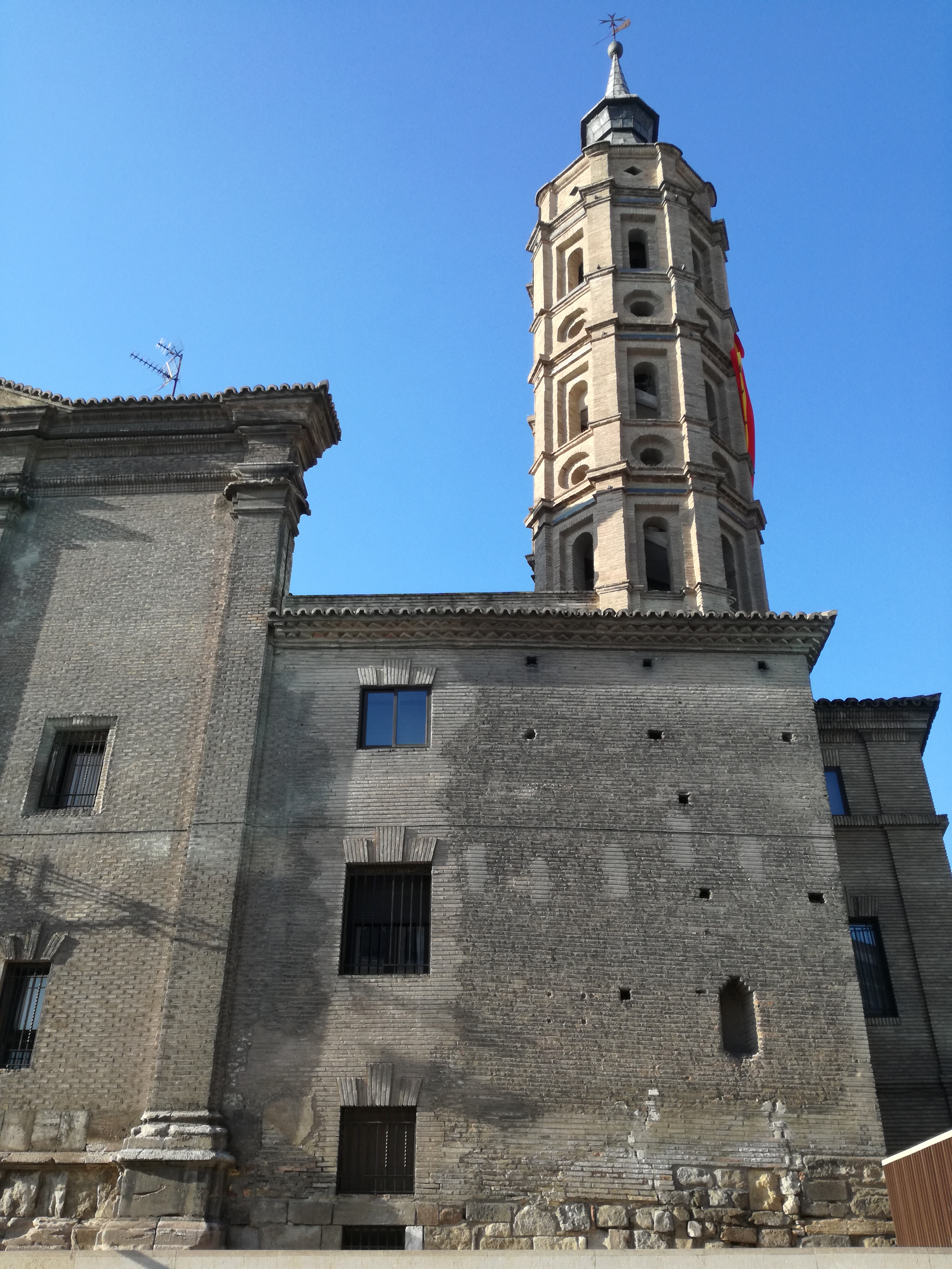 Chiesa e Campanile di San Juan de los Panetes